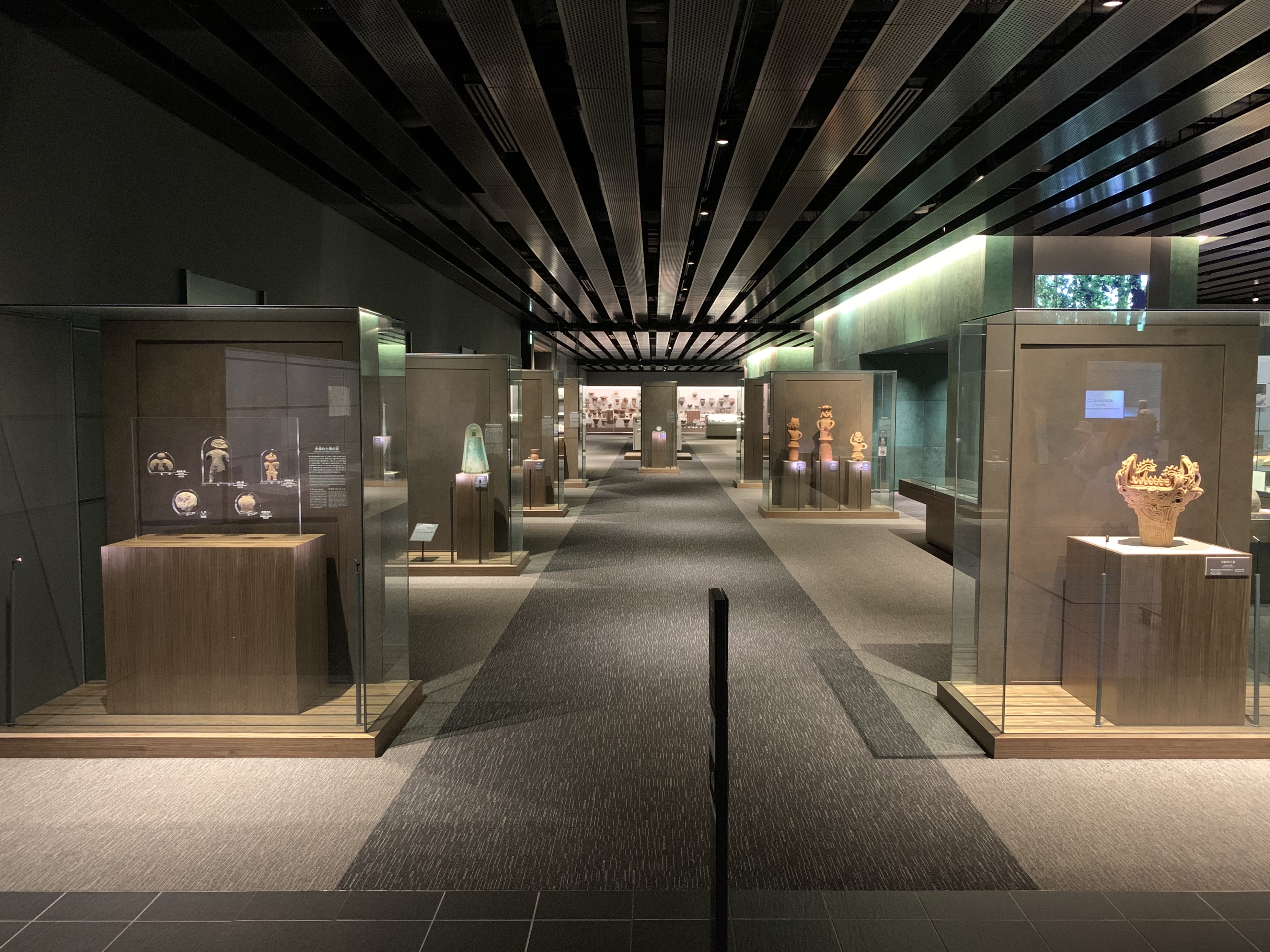 國學院大學博物館の考古展示室の写真